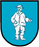 Herb Ziemięcic (gmina Zbrosławice, powiat tarnogórski, województwo śląskie, Polska)